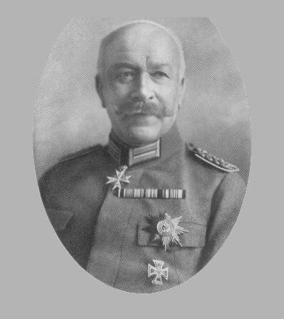 General Hermann von François